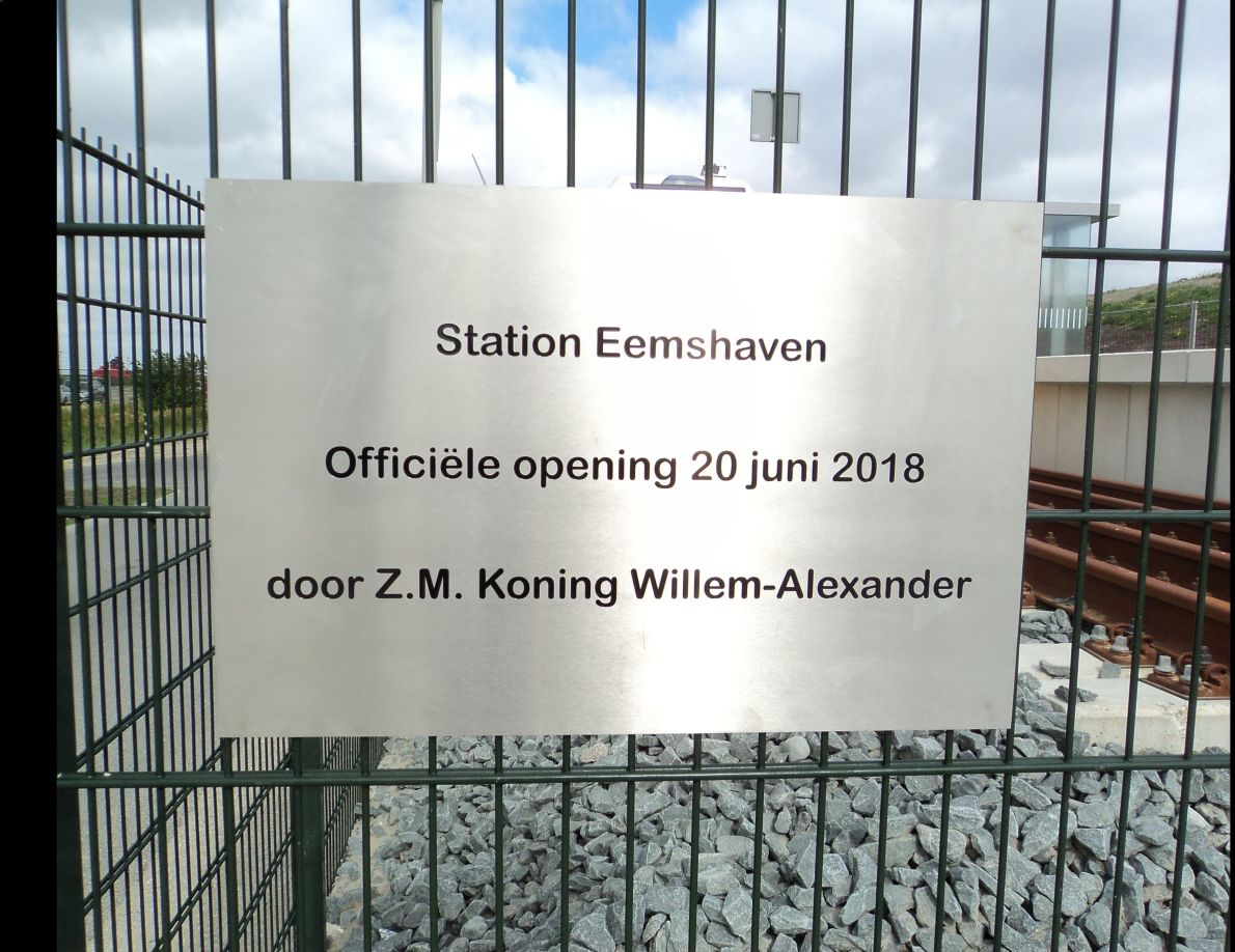 Das Bild zeigt die Erinnerungsplakette zur offiziellen Einweihung des Bahnhofes Eemshaven durch König Willem-Alexander der Niederlande am 20. Juni 2018